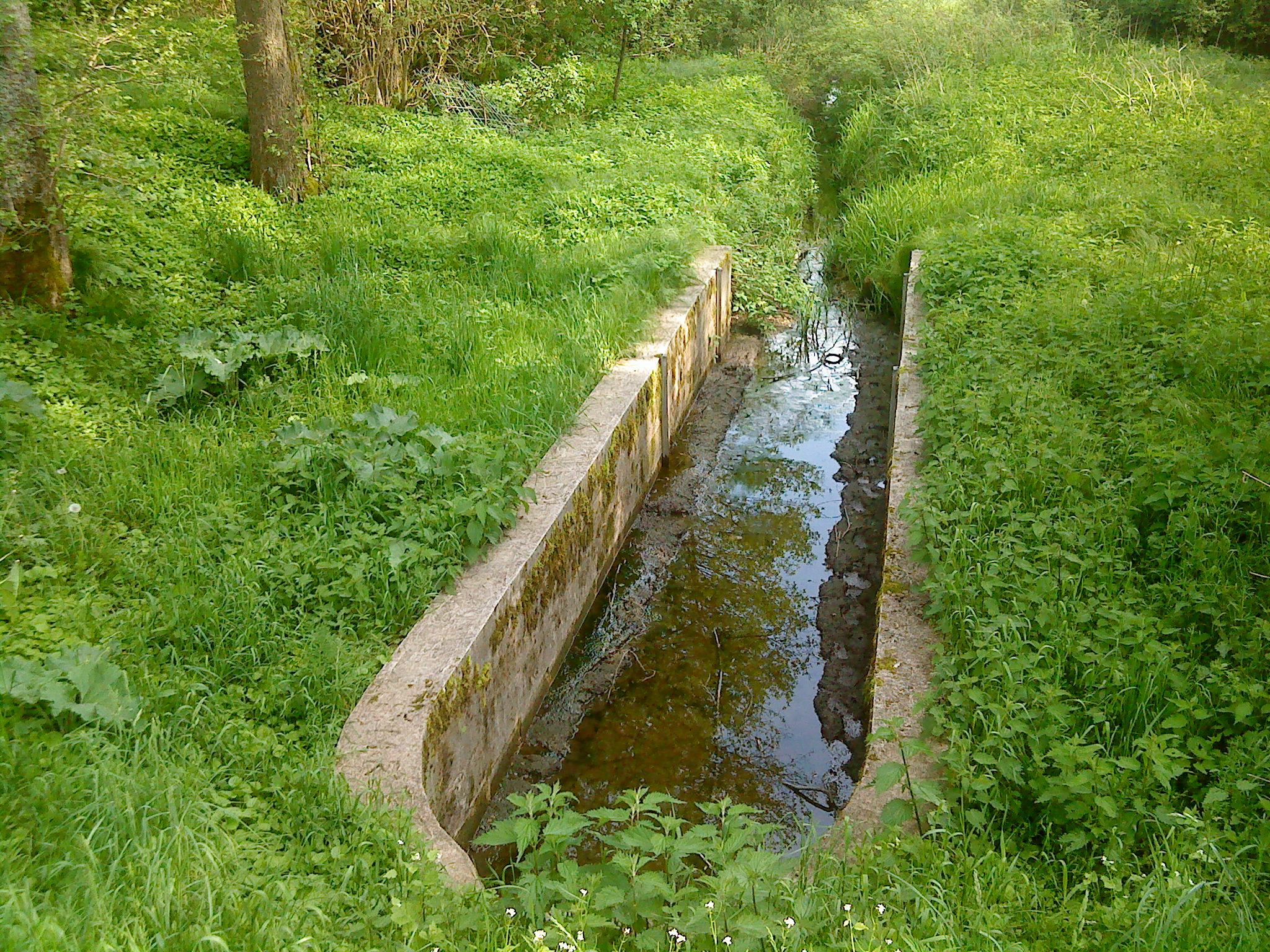 Der Abfluss des Weihergrabens aus dem Craimoosweiher